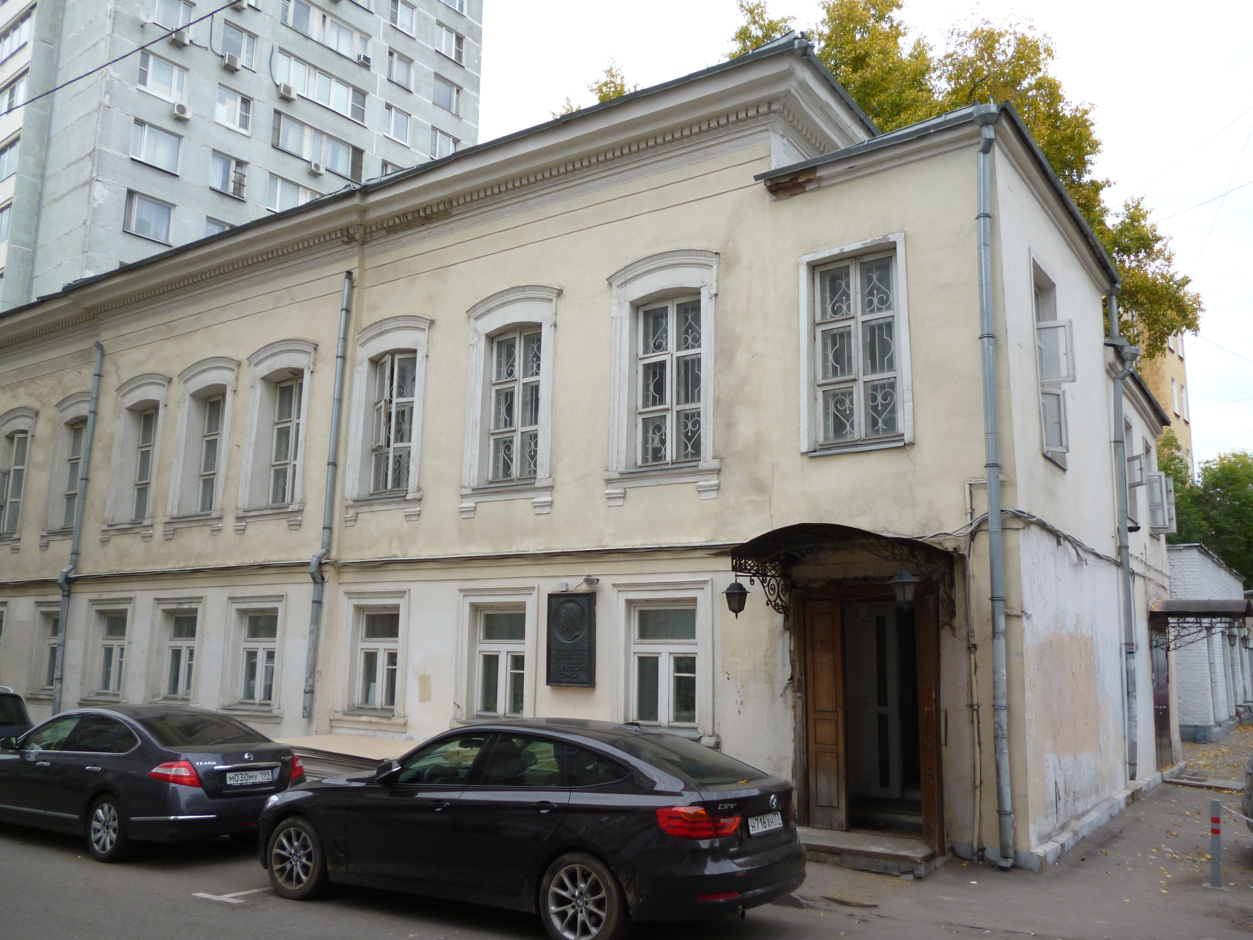 Дом, в котором жил Пушкин Александр Сергеевич у своего друга П.В.Нащокина в 1836 г.: Воротниковский пер., дом 12, строение 1, Тверской, Центральный округ, Москва